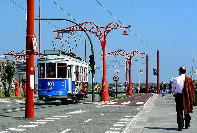 Tranvías na Coruña